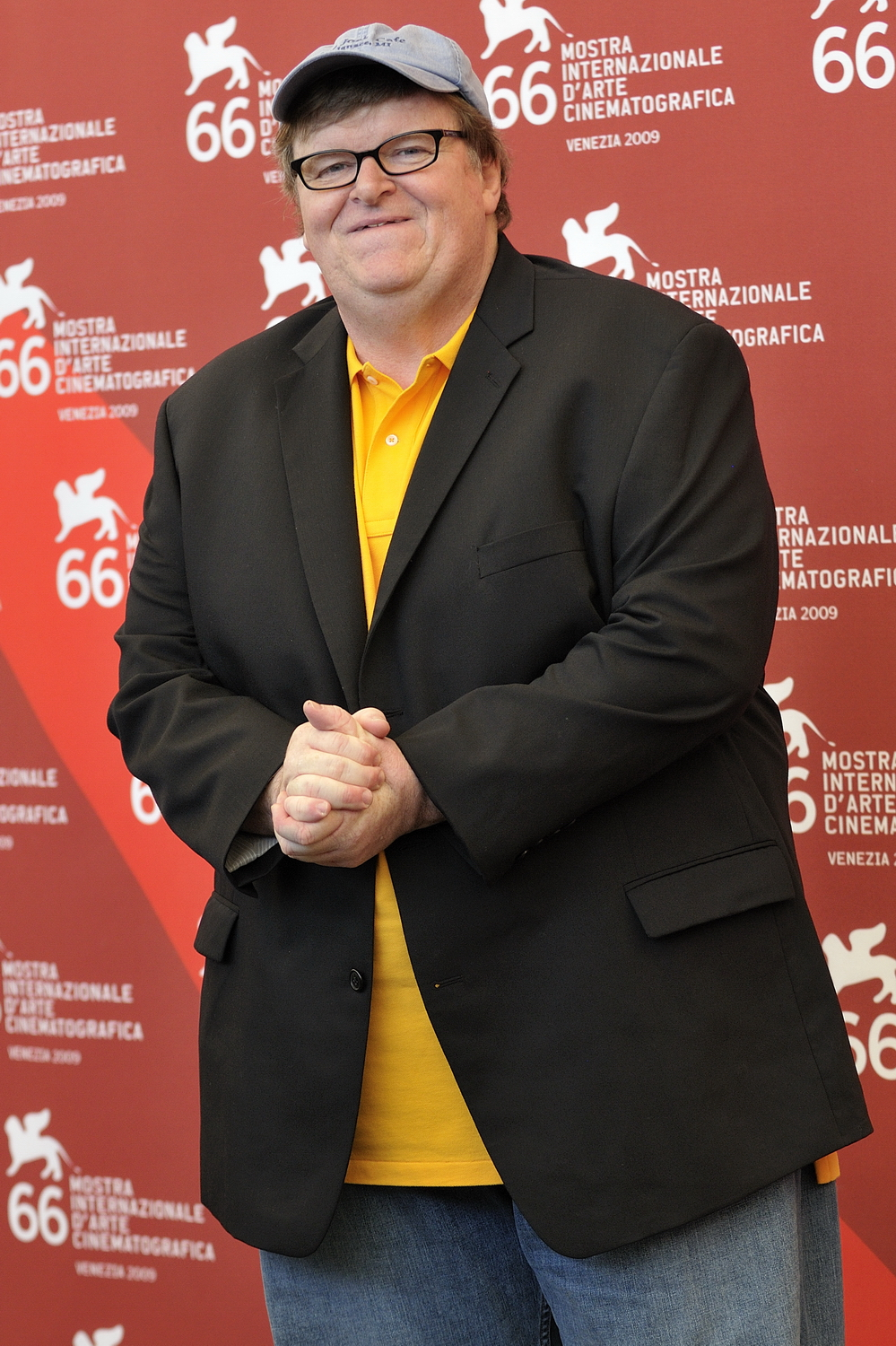 66ème Festival du Cinéma de Venise (Mostra), 5ème jour (06/09/2009) Photocall avec Michael Moore pour son film en compétition : Capitalism, Love Story